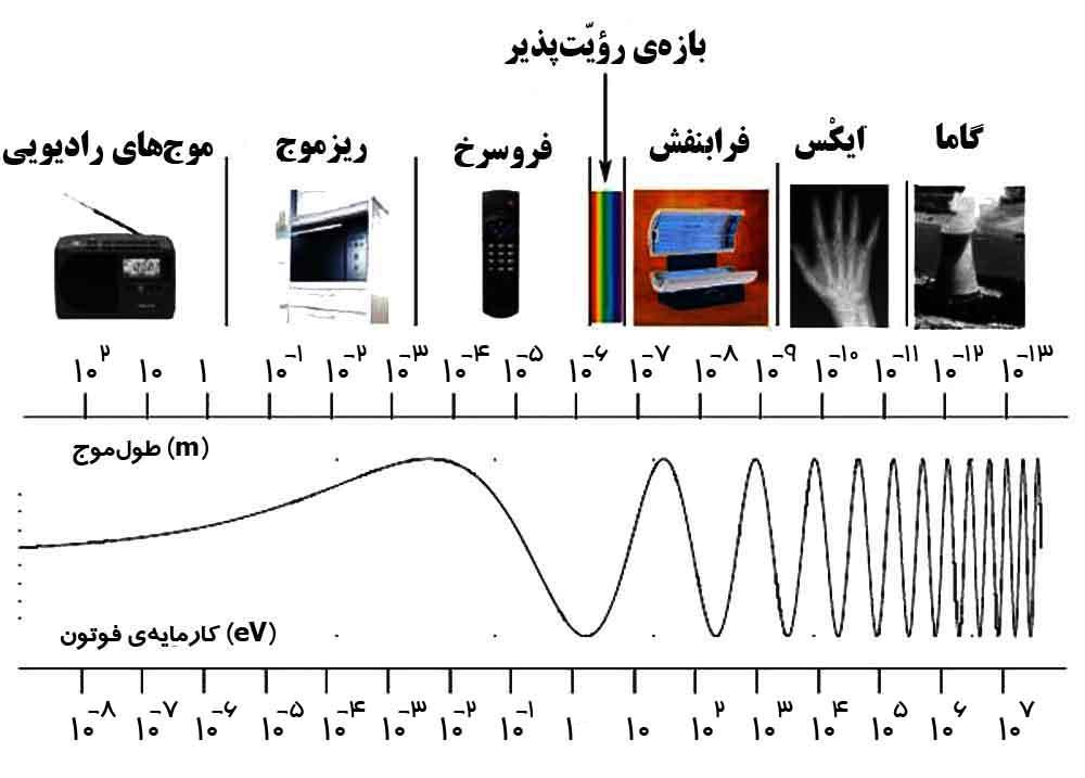 بیناب الکترومغناطیسی